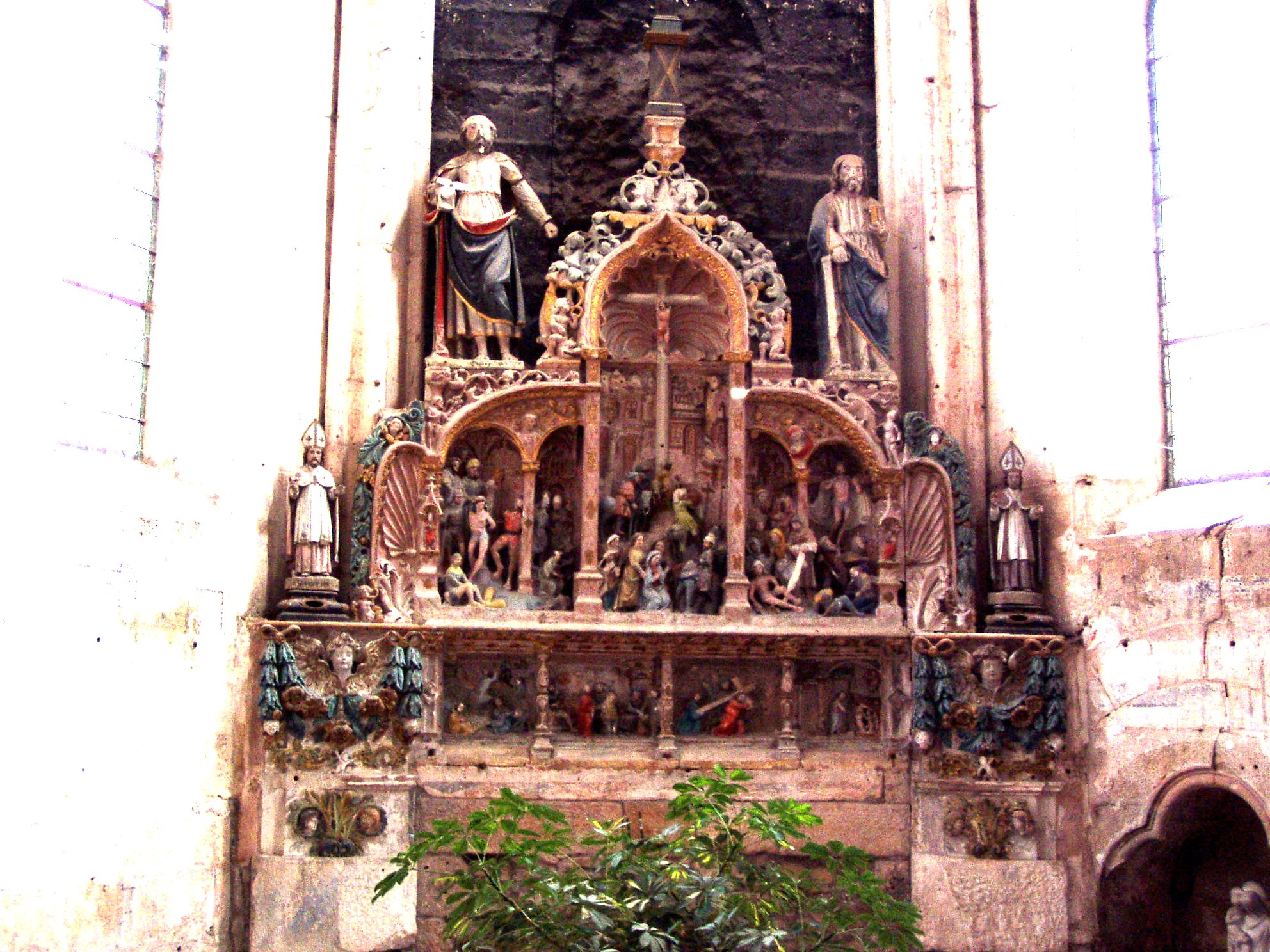 vue générale du retable de la Passion de l'église d'Aignay-le-Duc en Côte-d'Or